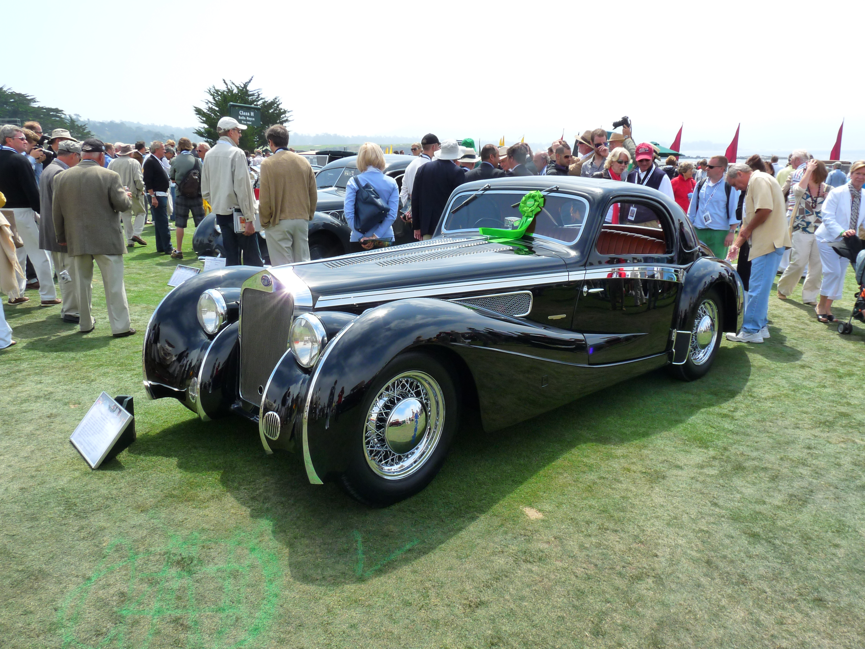 1937 Delage D8 S Letourneur et Marchand Aerodynamic Coupe